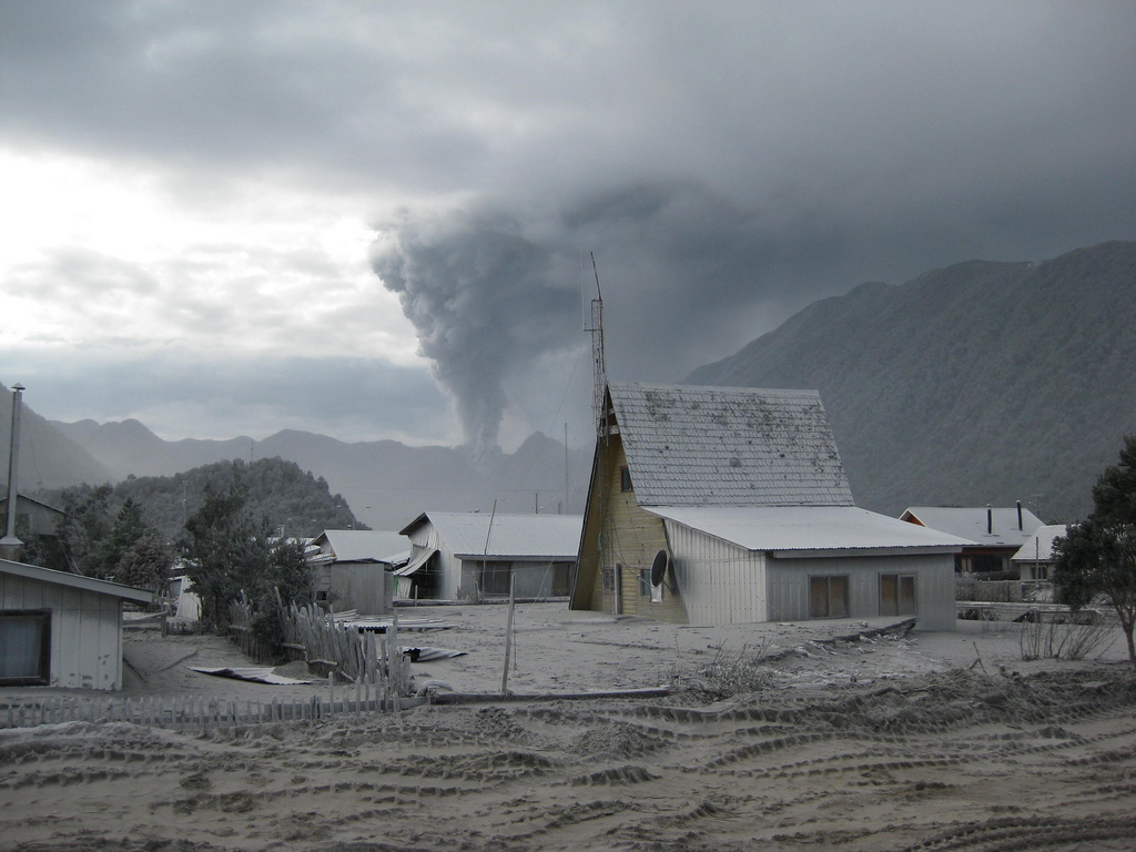 Chaitén(en huilliche, canasto de agua) es una comuna y localidad chilena, ubicada en la Provincia de Palena, X Región de Los Lagos. Chaitén es la principal ciudad y capital, tanto de la comuna homónima como de la Provincia de Palena, siendo una de las puertas de entrada a la Patagonia chilena. En mayo de 2008, la erupción del cercano volcán Chaitén provocó la evacuación de todos los habitantes de la comuna, convirtiendo a Chaitén prácticamente en un pueblo fantasma.